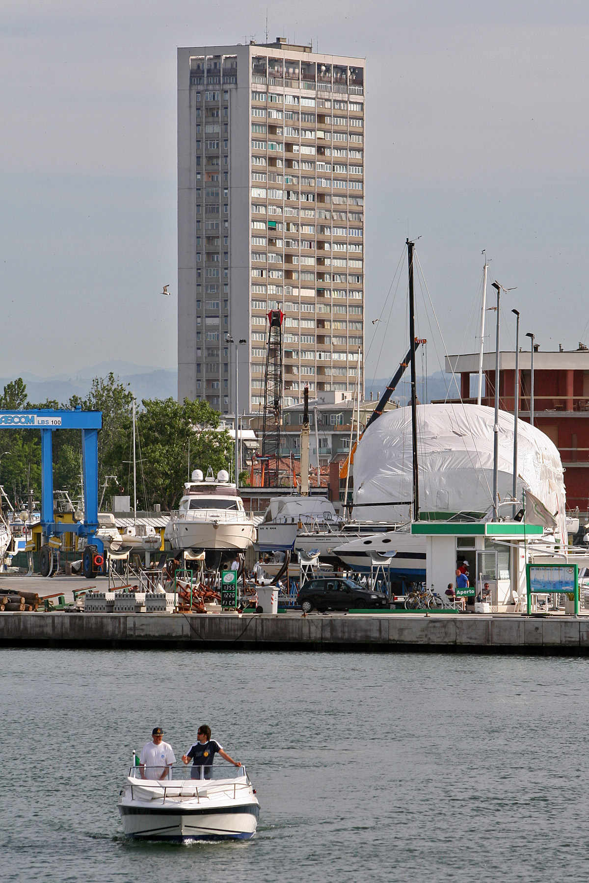 Rimini, Emilia Romagna, ItaliaGrattacielo